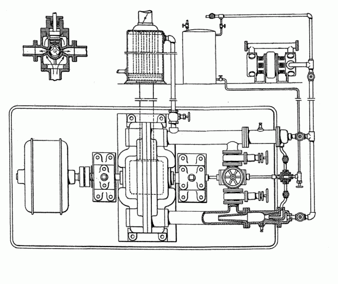 Tesla